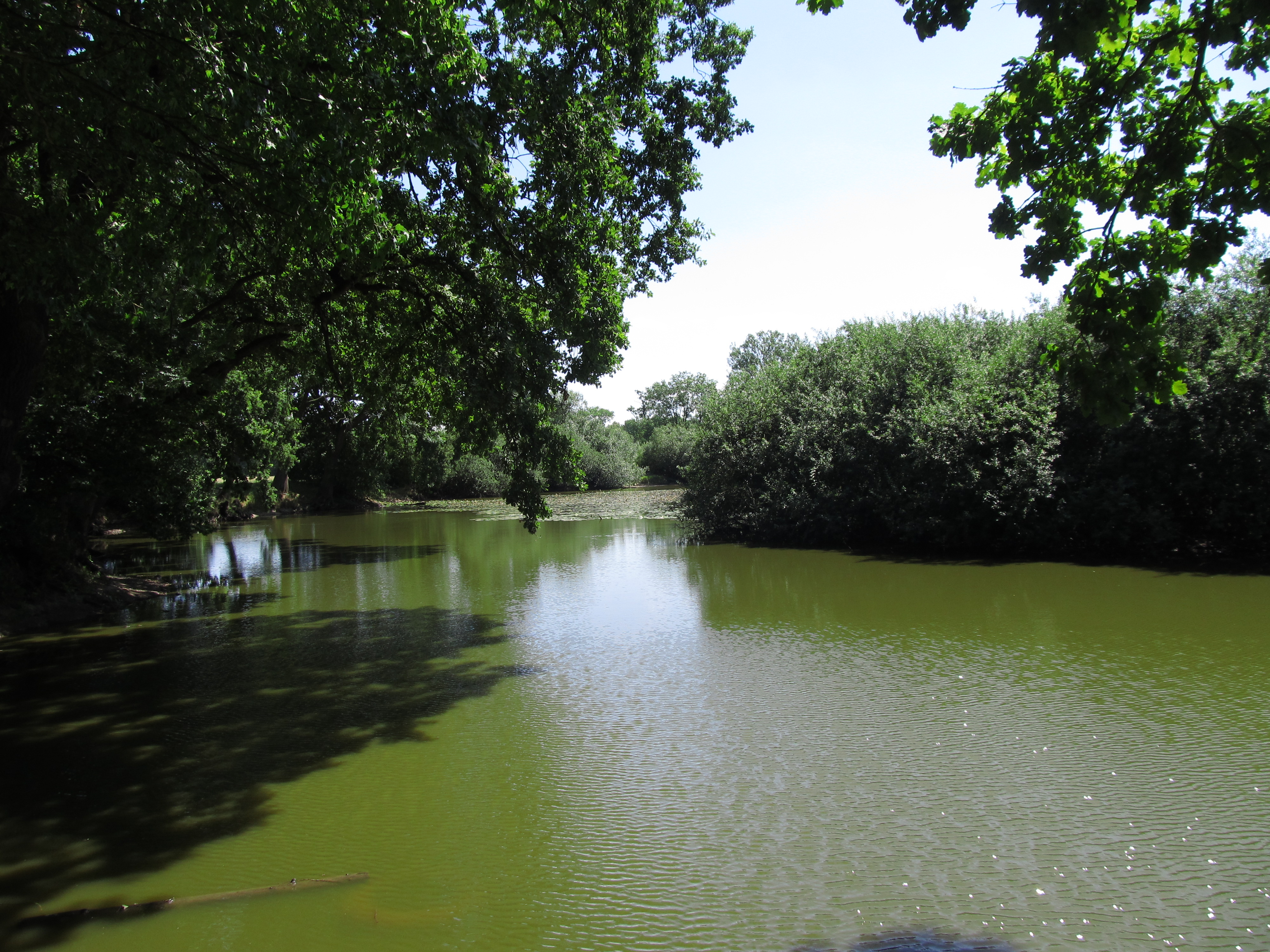 jedna z tůní